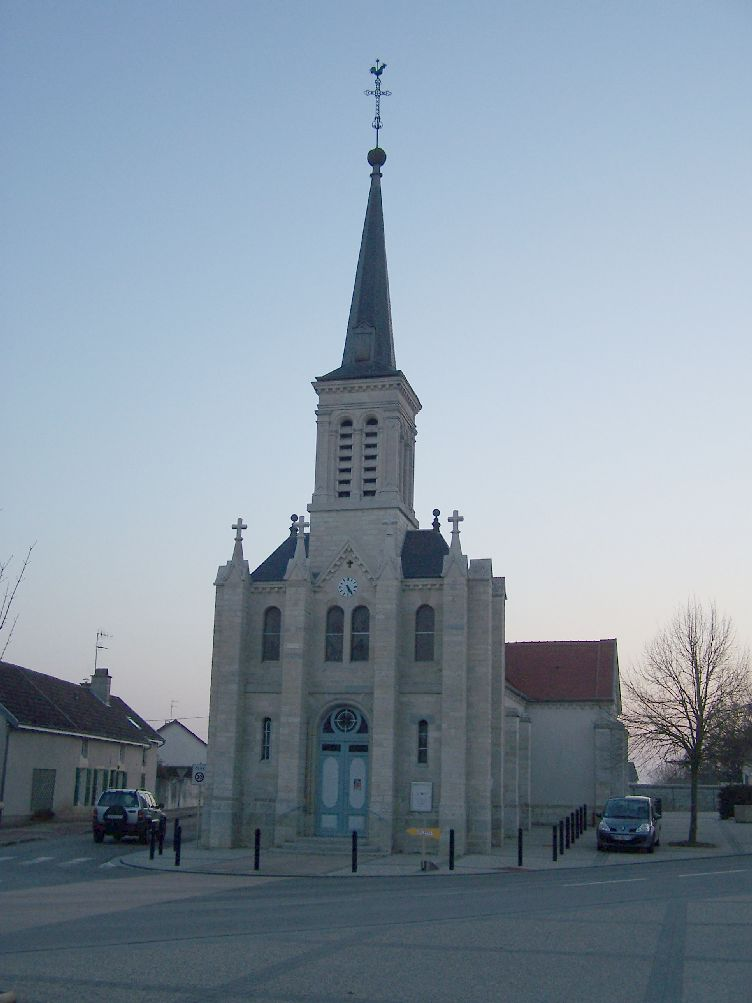 église de Brognon (Côte d'or) FRANCE